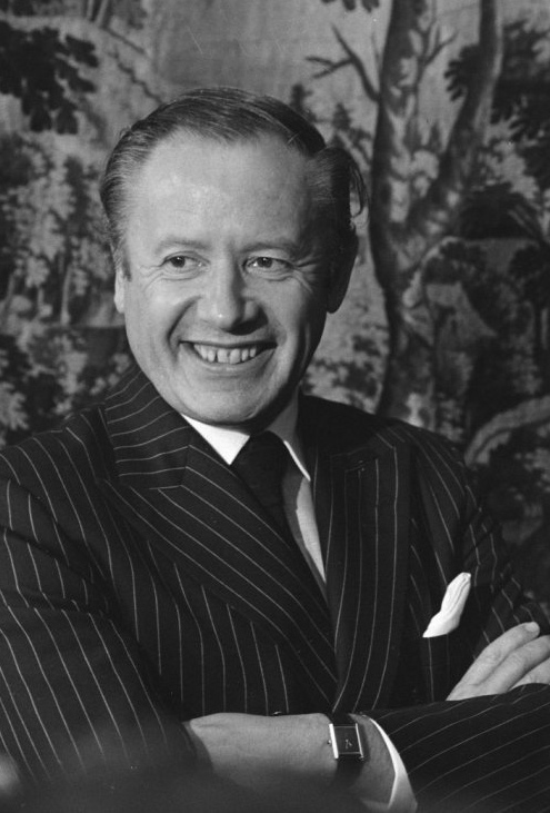 De Lëtzebuerger Ausseminister Gaston Thorn, am Oktober 1980 bei enger Visite zu Den Haag bei sengem hollännesche Homolog Dries Van Agt.